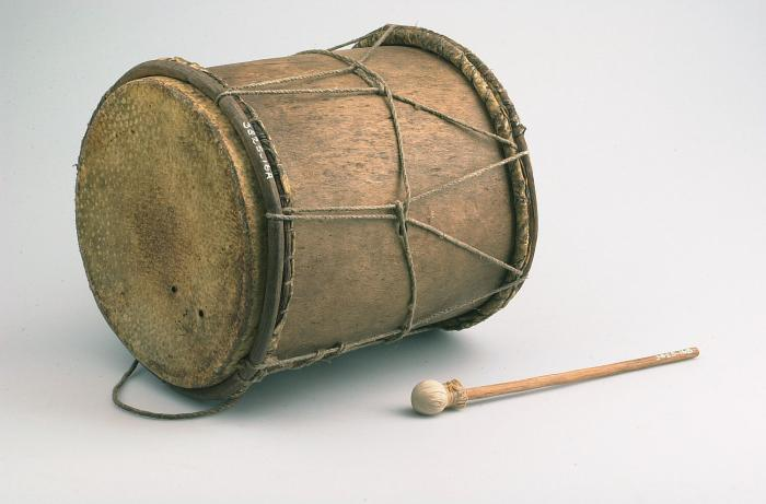 Slaginstrument. Dubbelvellige cilindrische trom